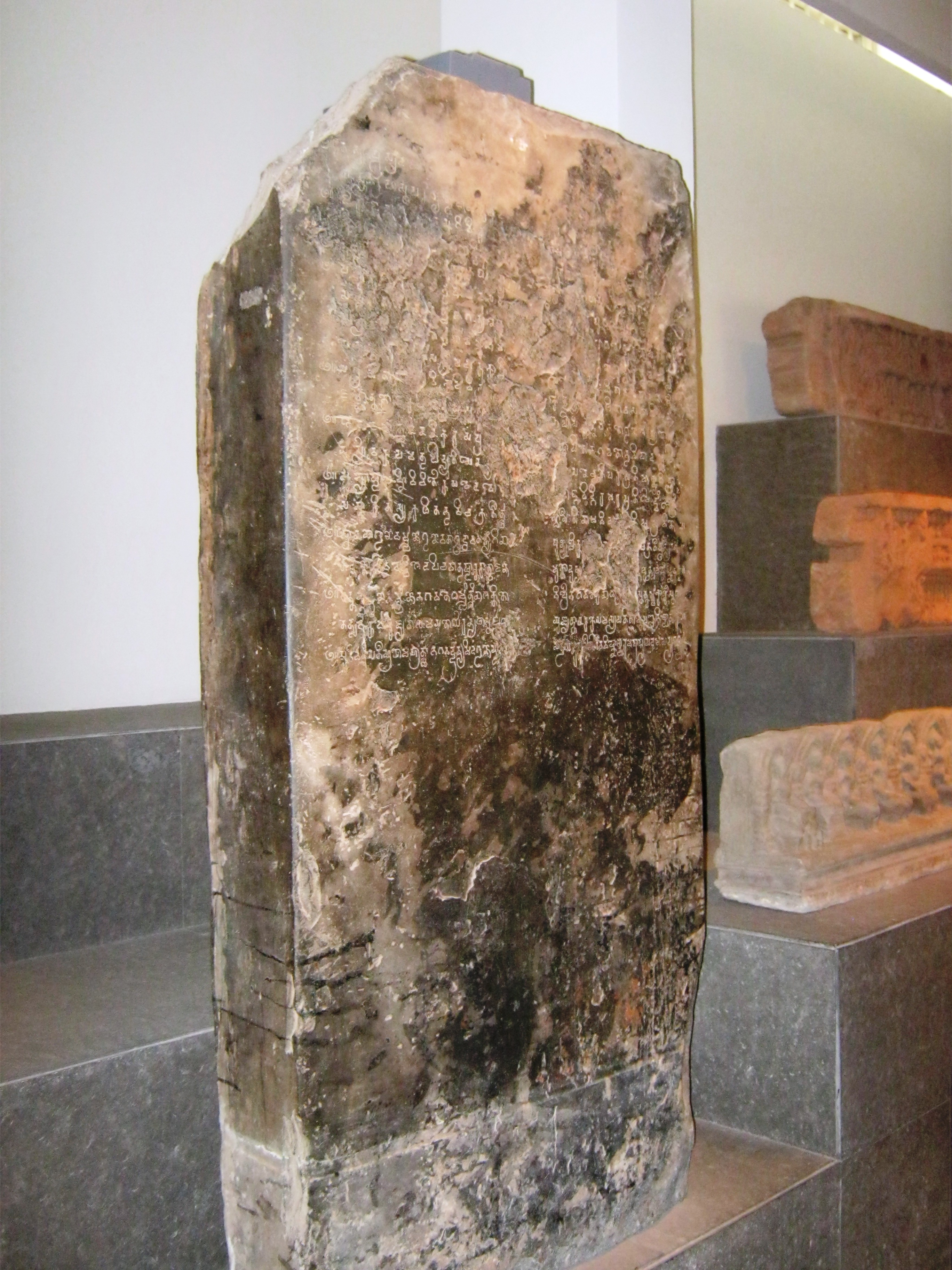 Bia Tháp Mười. Đây là một bia đá cổ có khắc chữ viết, cao 189 cm, rộng 91 cm, được tạo tác vào thời Phù Nam (khoảng thế kỷ 2 đến thế kỷ 3), được tìm thấy ở Tháp Mười (Đồng Tháp). Hiện vật đang được trưng bày trong Bảo tàng lịch sử Việt Nam tại TP. Hồ Chí Minh.